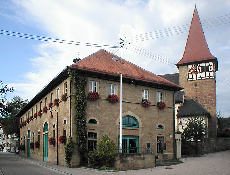 Alte Kelter (heute: Bürgerhaus) und ev. Kirche in Haberschlacht (Brackenheim)